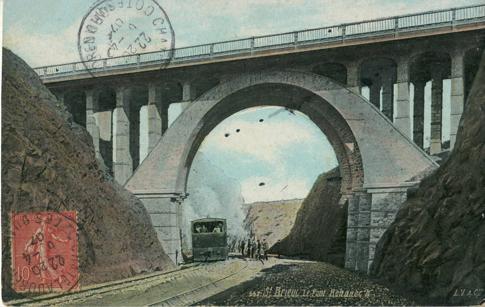 Carte postale ancienne éditée par L. V. & Cie, n°647 : SAINT-BRIEUC - Le Pont Rohanec'h